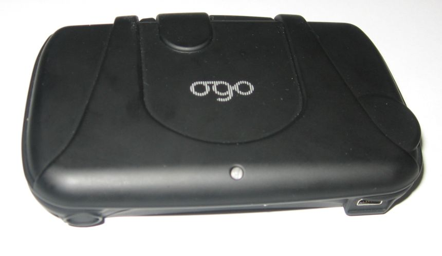 Ogo im zugeklappten Zustand